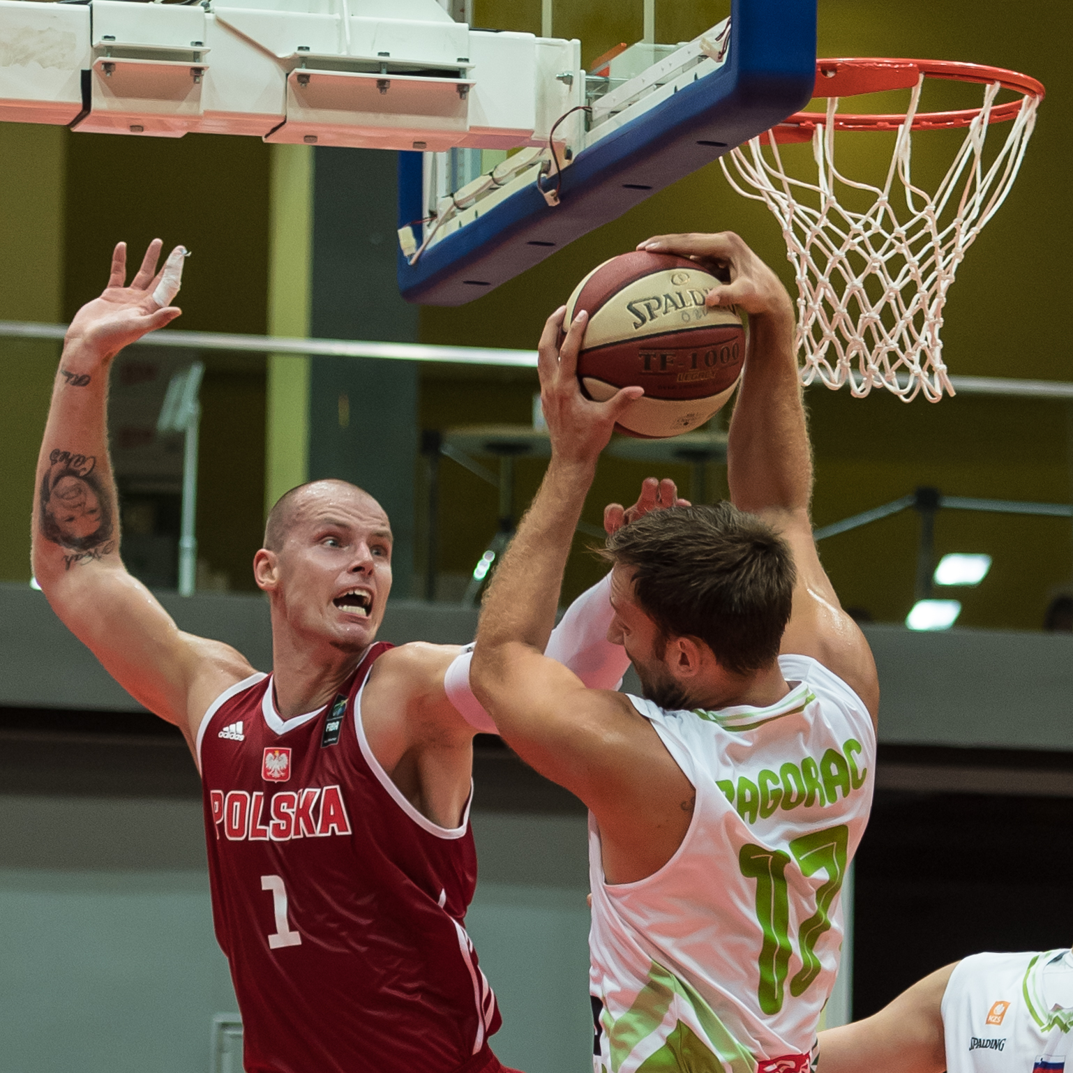 ÖBV Vier-Nationen-Turnier vom 12.-14. August 2016 in Schwechat: Slowenien vs Polen. Bild zeigt Maciej Lampe (POL) und Sasa Zagorac (SLO).